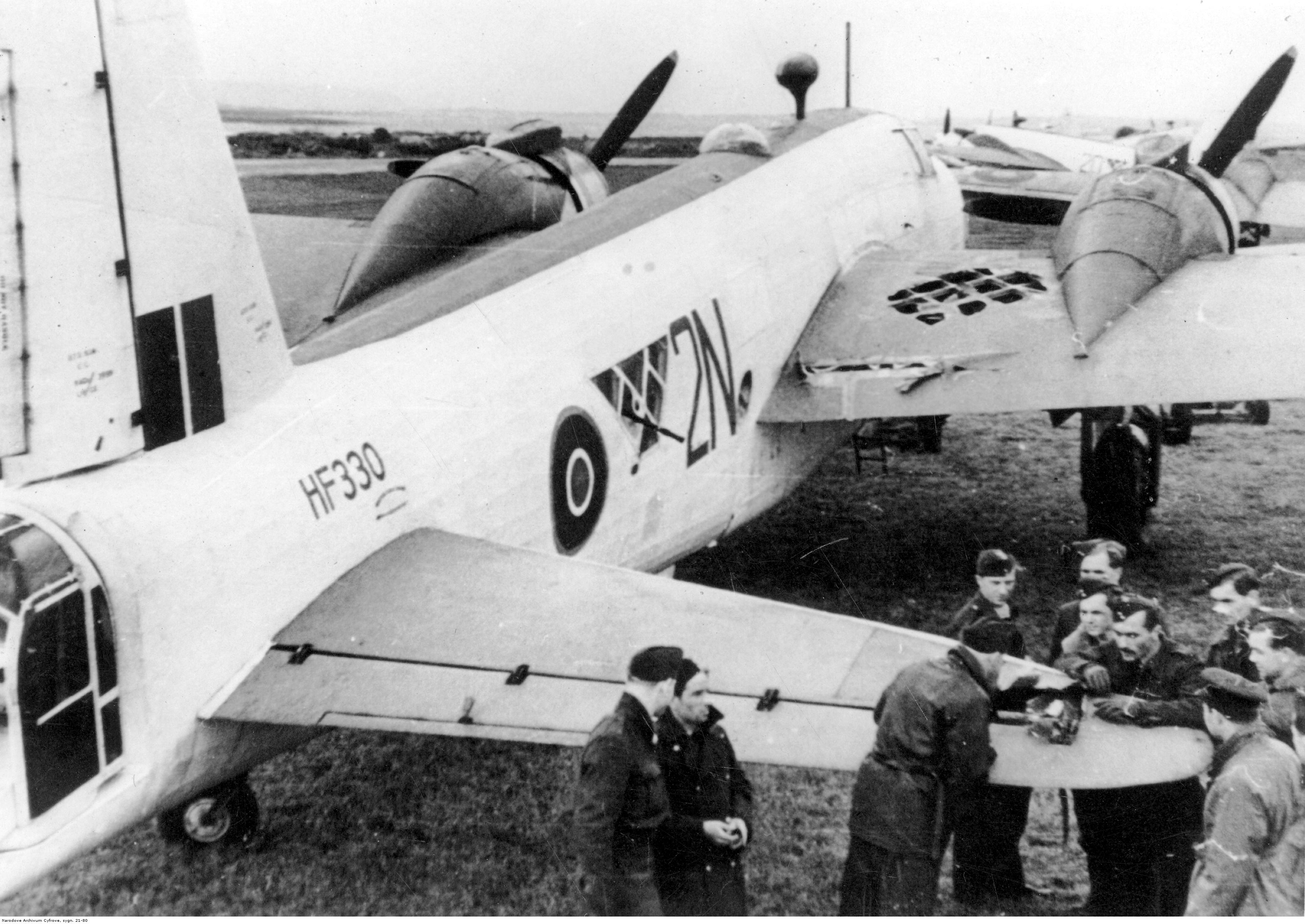 Samolot bombowy Wellington GR Mk XIV polskiego 304 dywizjonu bombowego na lotnisku. Samolot jest uszkodzony po walce, podczas której zatopił niemiecki okręt podwodny (U-321?). Widoczni także lotnicy.